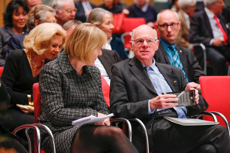 Gabriele Weber, Westwind-Schatzmeisterin, und Norbert Lammert